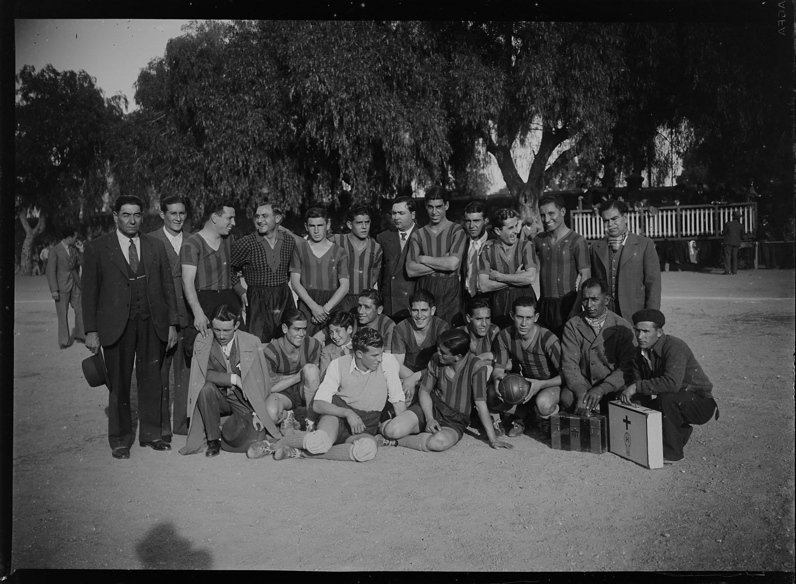 El Club Atletico San Martin de San Juan, en San Luis, hacia el año 1930. Posan alegremente haciendo algún chiste, jugadores del verdinegro junto a sus utilero y se cola en la foto el utilero del Club Huracan, lo que permite deducir algun enfrentamiento entre ambos en la "Cancha Colón", actual terminal de ómnibus de la capital Sanluiseña.